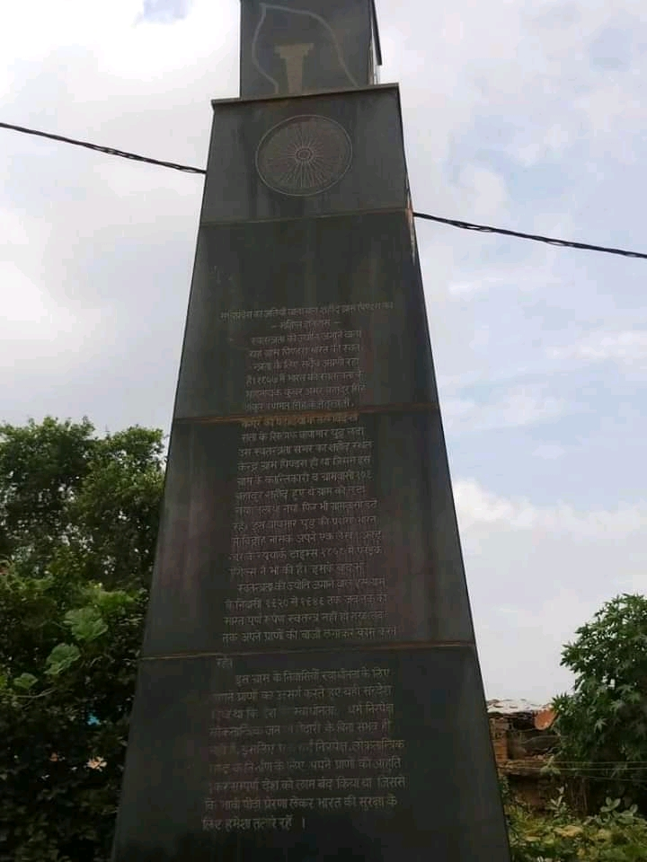 बहेलिया